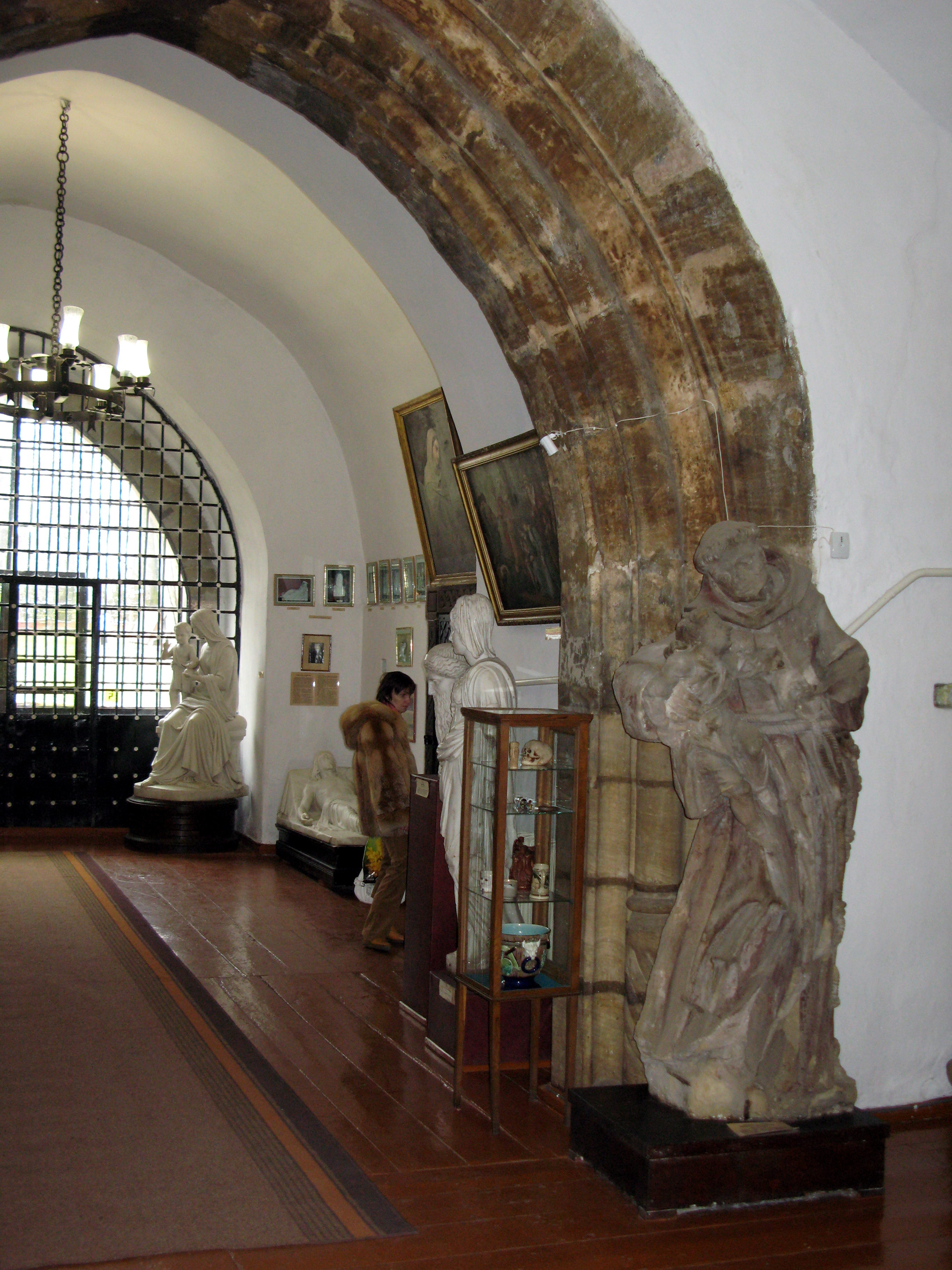 Замок князiв Острозьких (мур.), Острог, вул.Замкова, 5